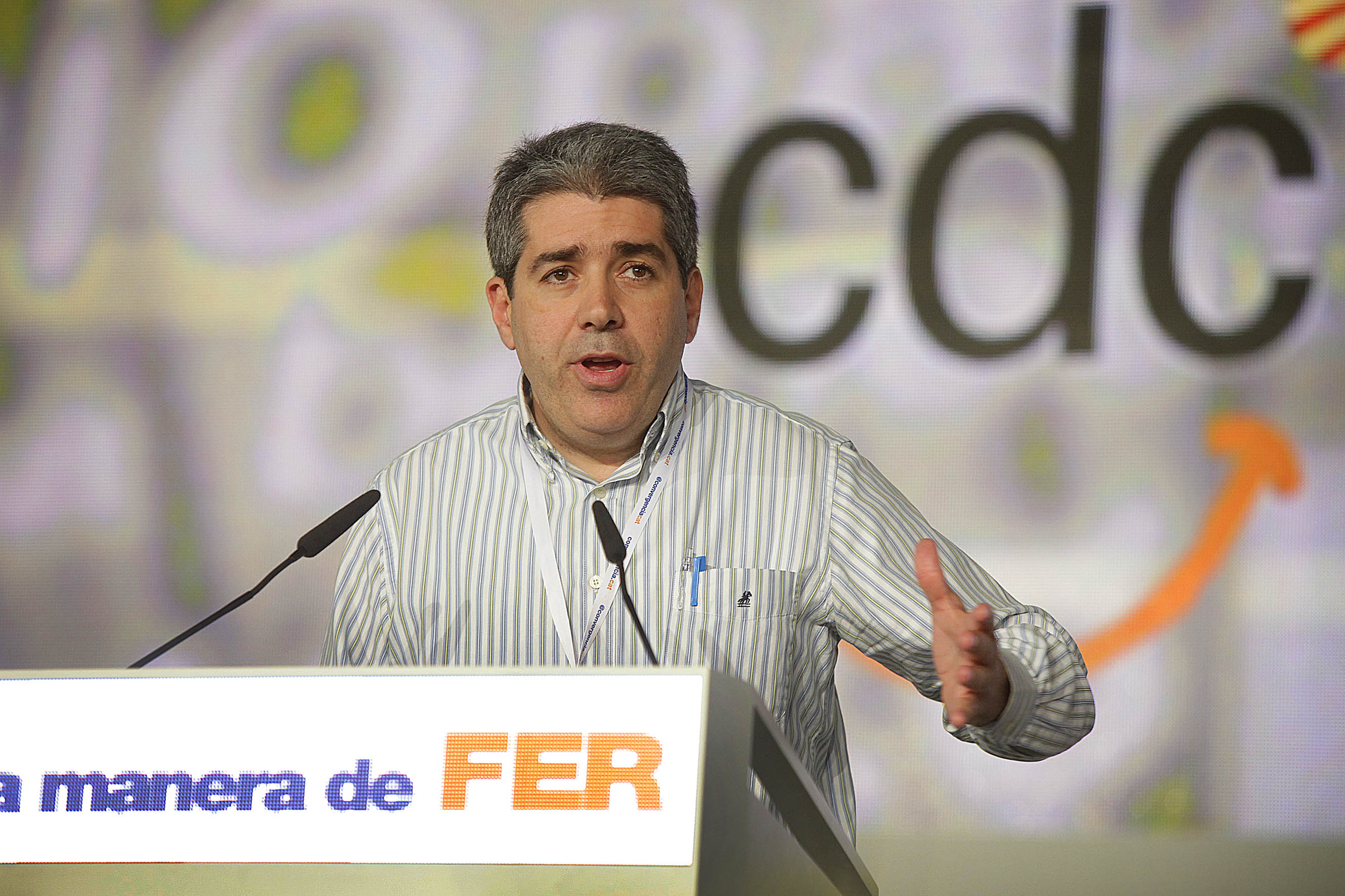 24.03.2012, Reus 16è Congrés de Convergència Democràtica de Catalunya a Reus. Presentació Candidatura a la Direcció Nacional. Francesc Homs. Foto: CDC/Jordi Play